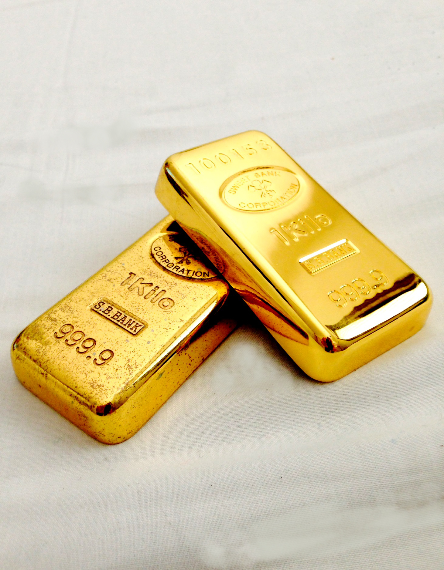 מטילי זהב